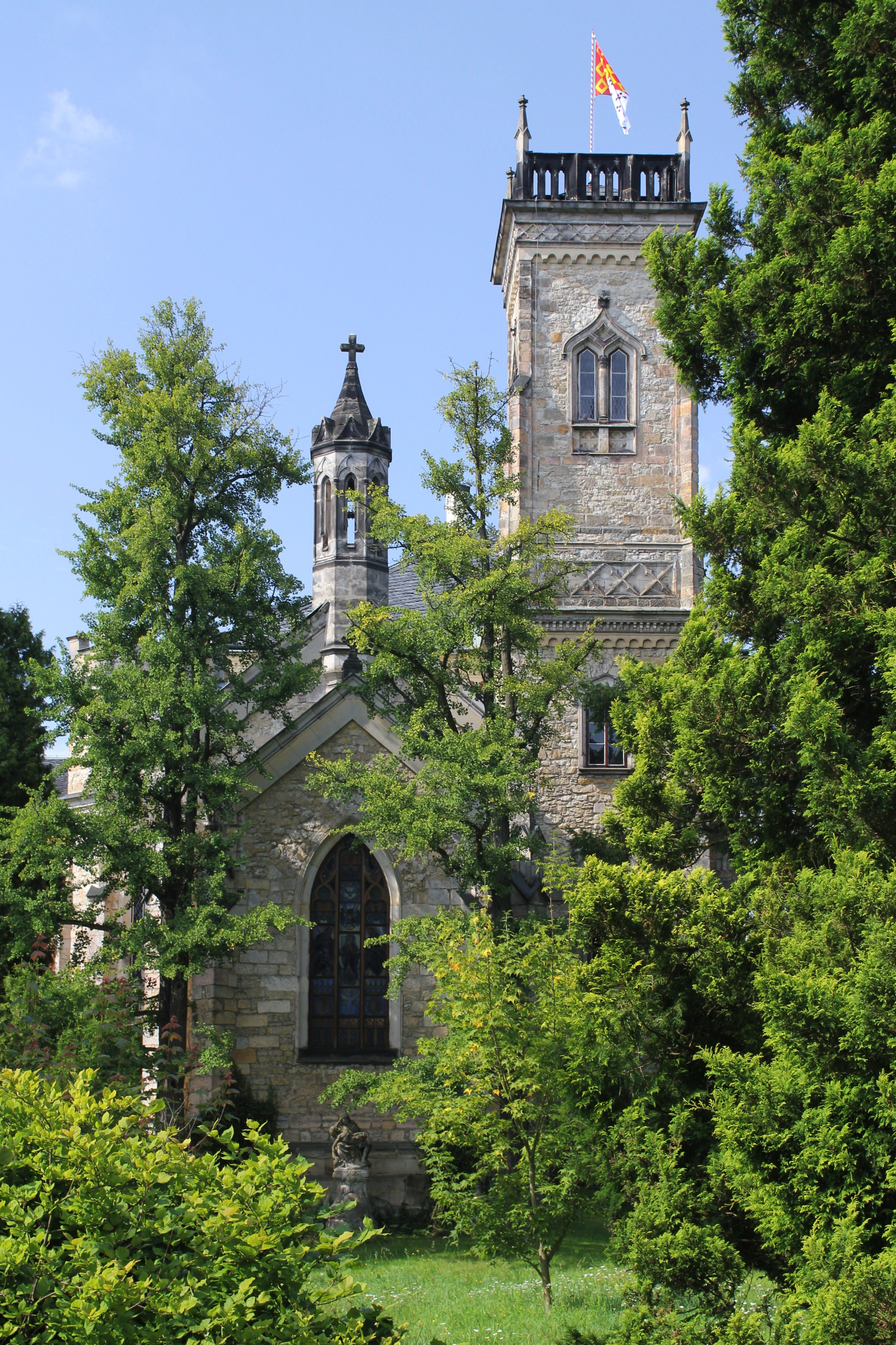 Zámecká kaple s Rakouskou věží zámku Sychrov